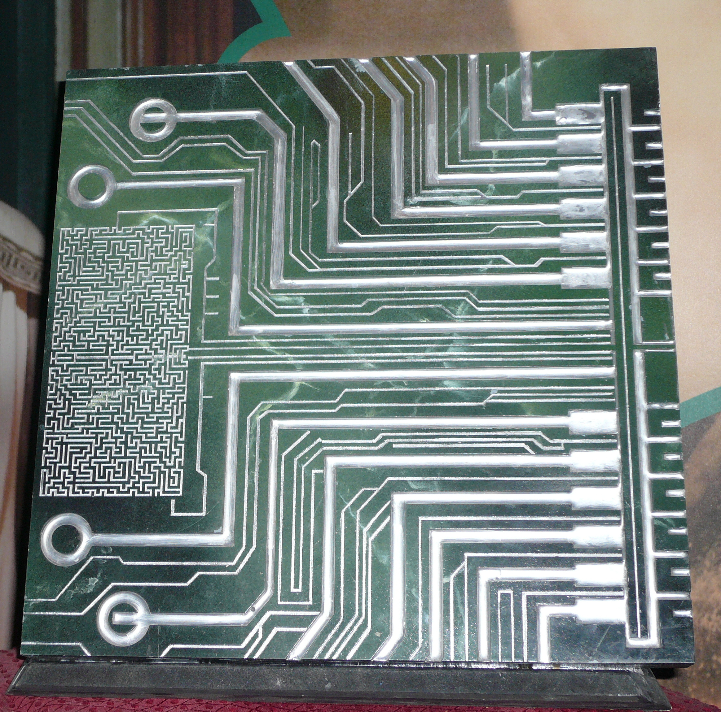 Lucius Petrus Dextrus Doctor Who Experience